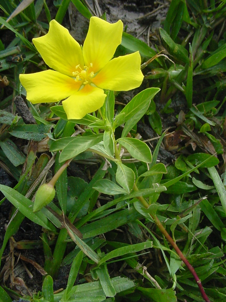 Ludwigia peploides subsp. peploides - ONAGRACEAE - Tavares ? RS - Brasil